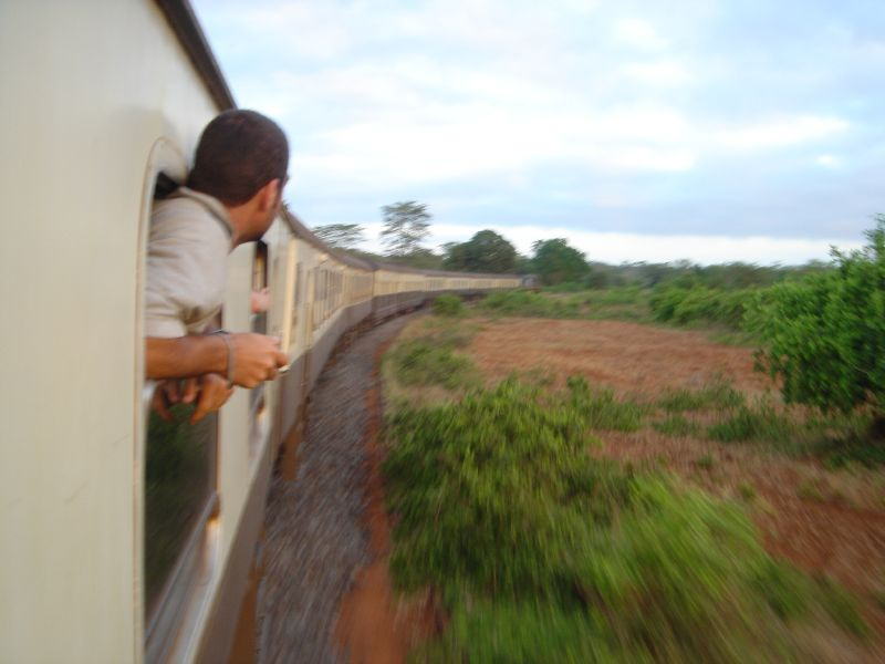 Tanzania Railways (TRC)